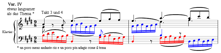 Takt 3 und 4 aus der vierten Variation des zweiten Satzes aus Beethovens Klaviersonate Opus 109